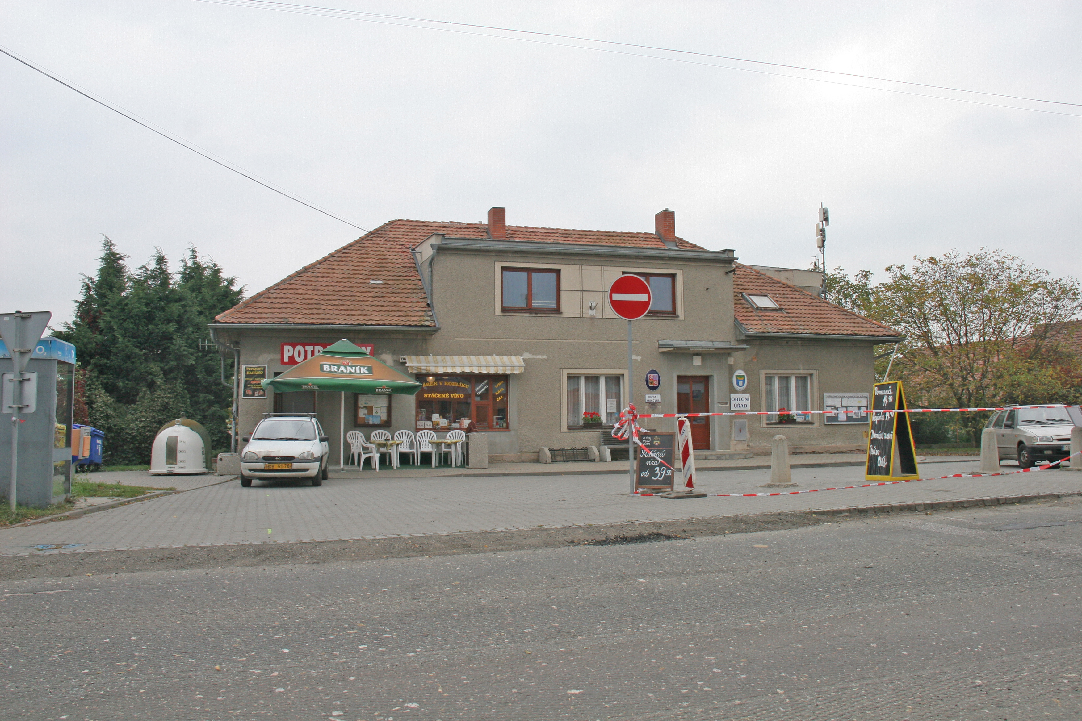 Blešno obecní úřad